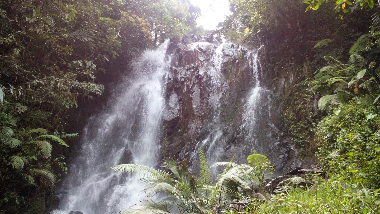 Curug Bunar, Wisata terkenal Desa Sukapada